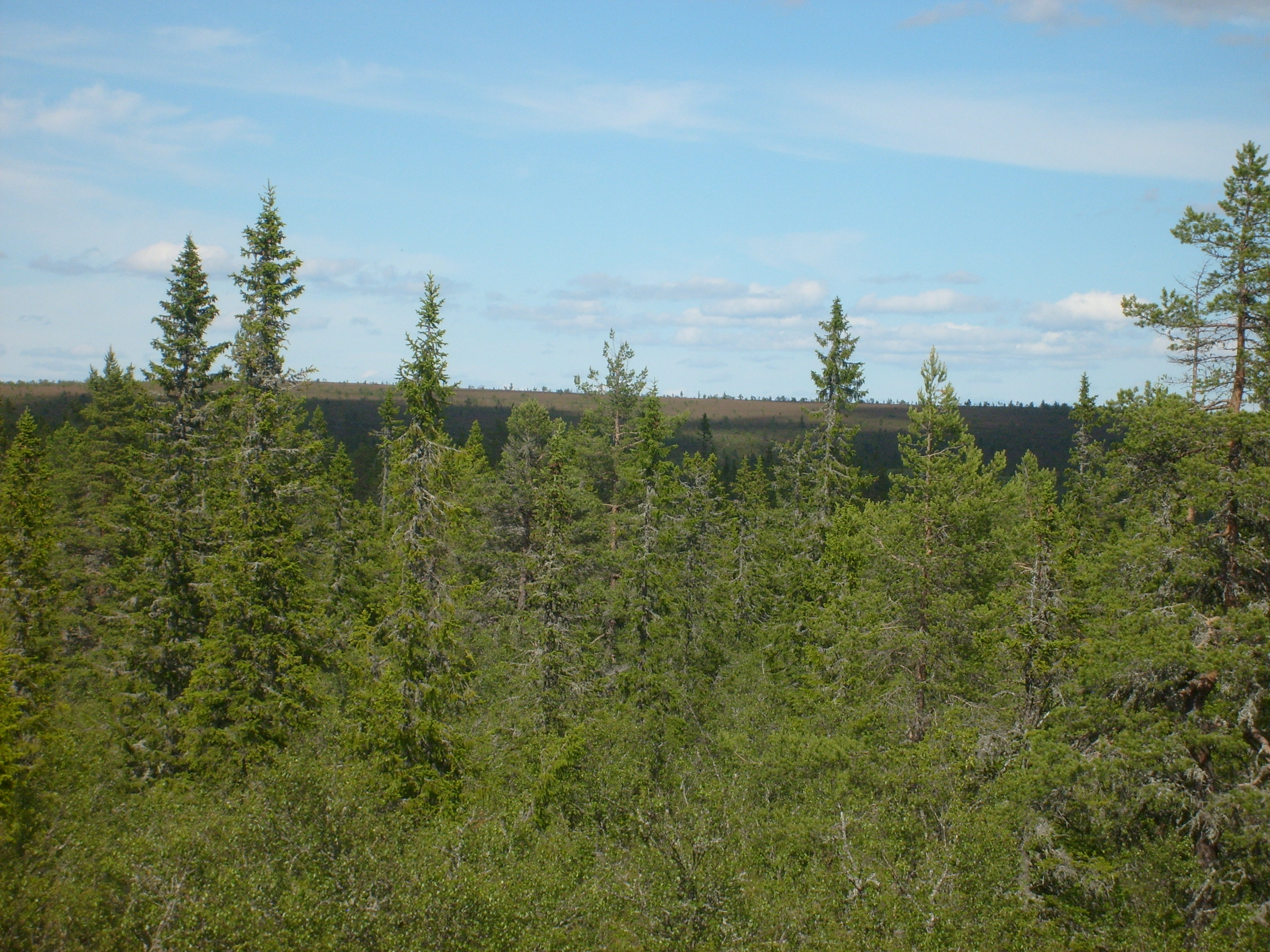 Vy från Rödberg mot Storvarden